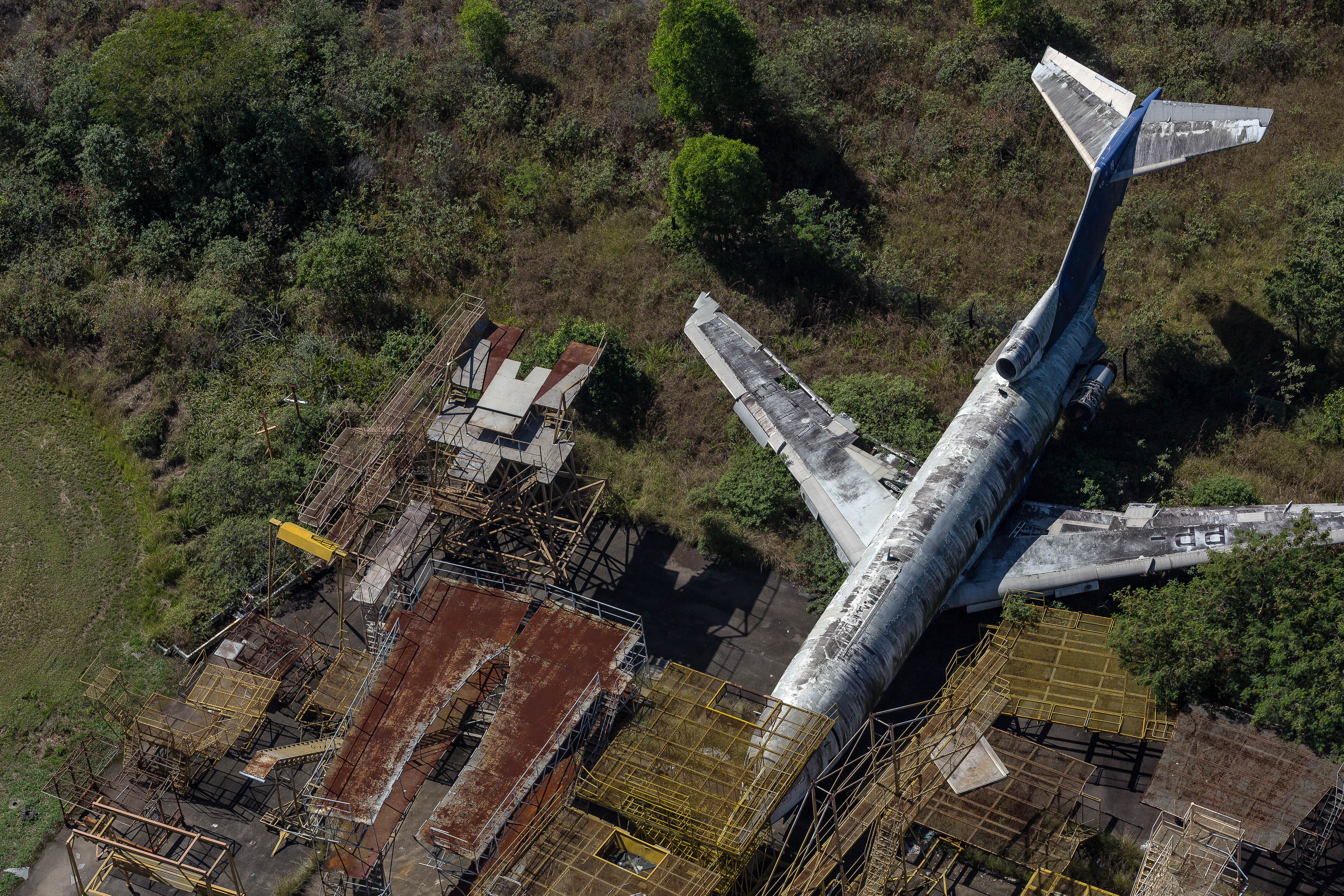 Vista aérea de um avião abandonado. Aeroporto do Galeão, Rio de Janeiro - RJ - Brasil.